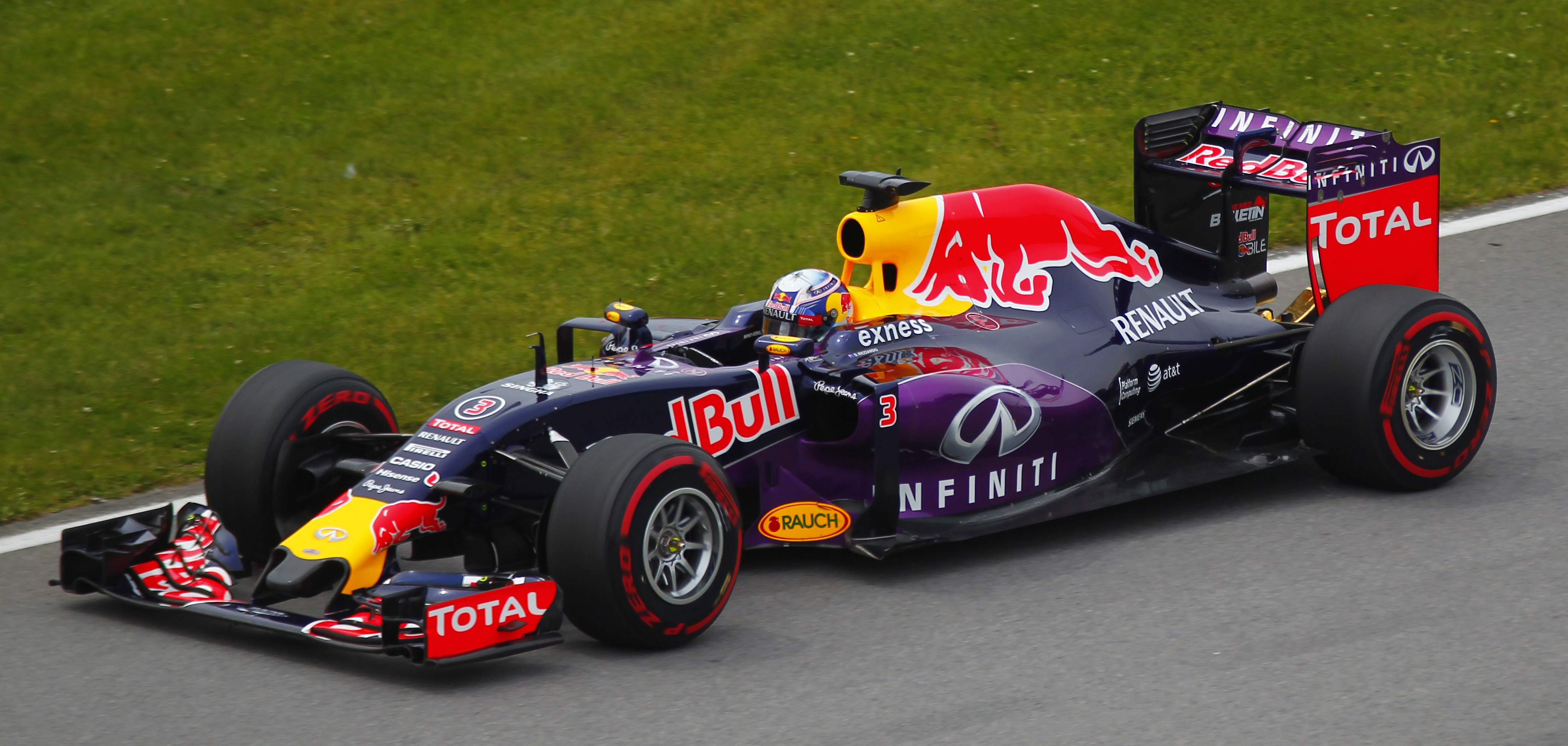 Daniel Ricciardo - Red Bull Racing - Grand Prix du Canada - Circuit Gilles-Villeneuve - 7 juin 2015 (Photo Paul-Émile Poulin-Jacques)